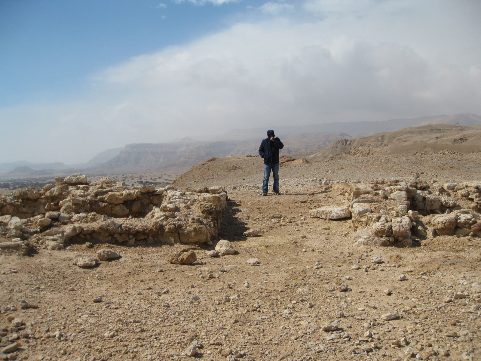 מצודת יוטבתה מתקופת הברזל, צולם מפנים המצודה כלפי מערב